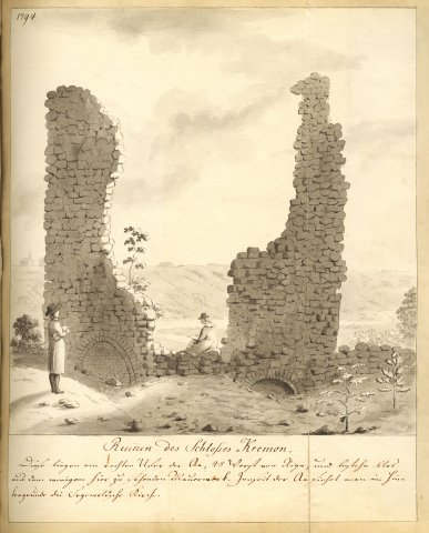 Scan from Johann Christoph Brotze's book Sammlung verschiedner Liefländischer Monumente. Ruinen des Schlosses Kremon. 1794 [K. G. Graß; die Ansicht].